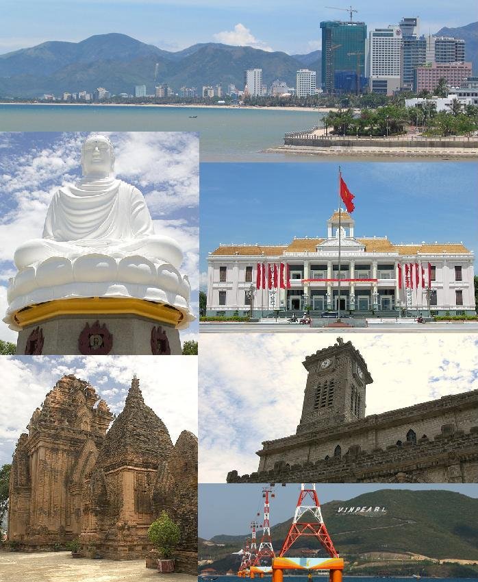 Nha Trang banner